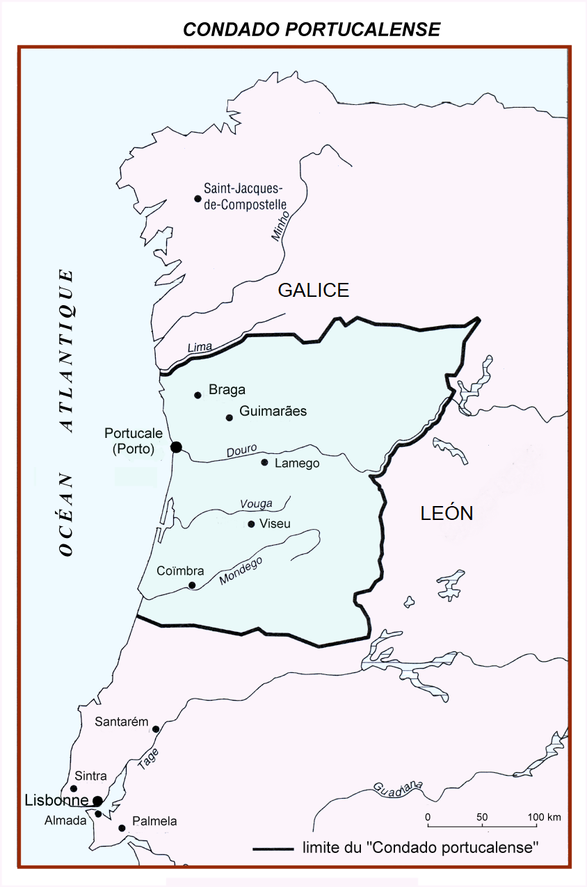 Carte du comté portucalense vers 1070